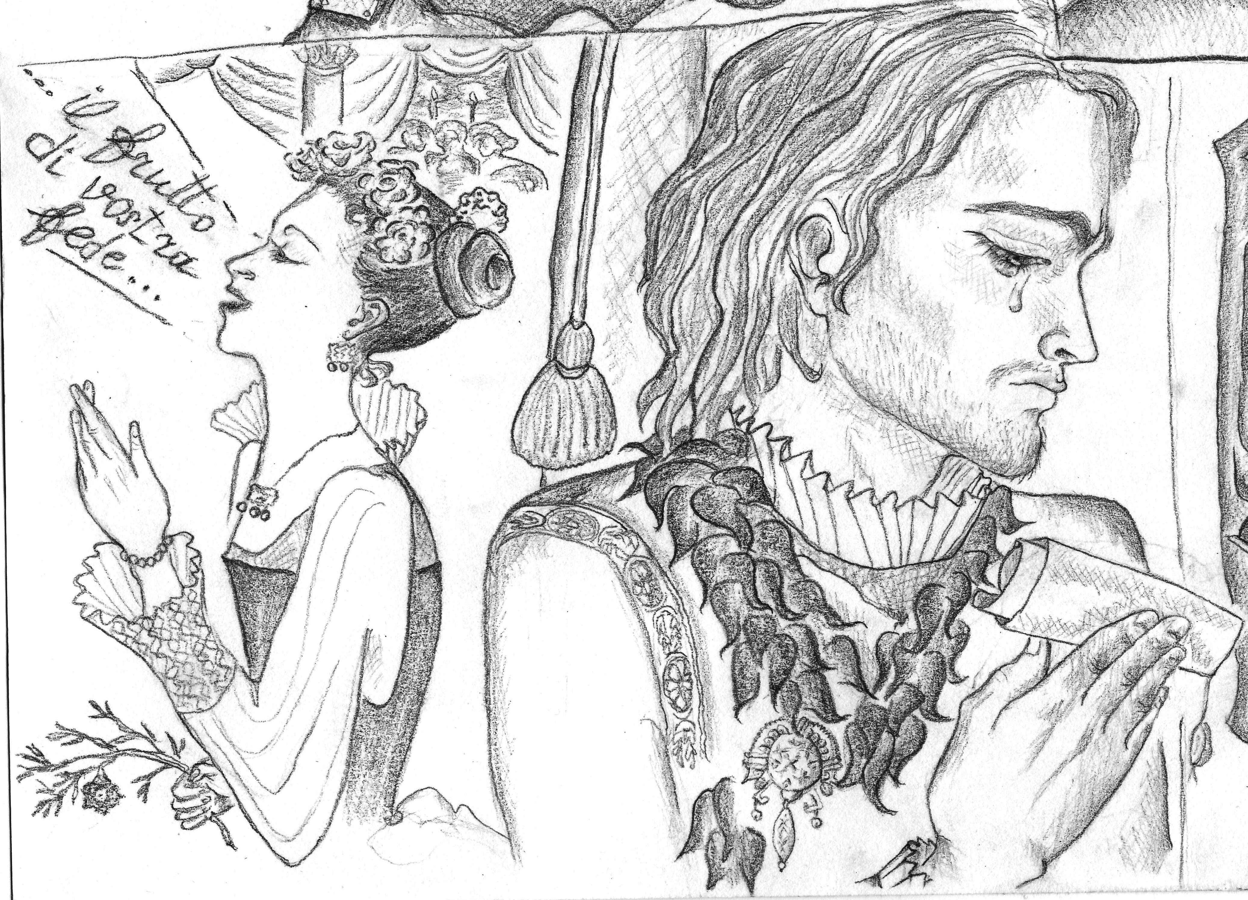 Граф Альберт видит Консуэло блистающей на оперной сцене и, по-видимому, забывшей его